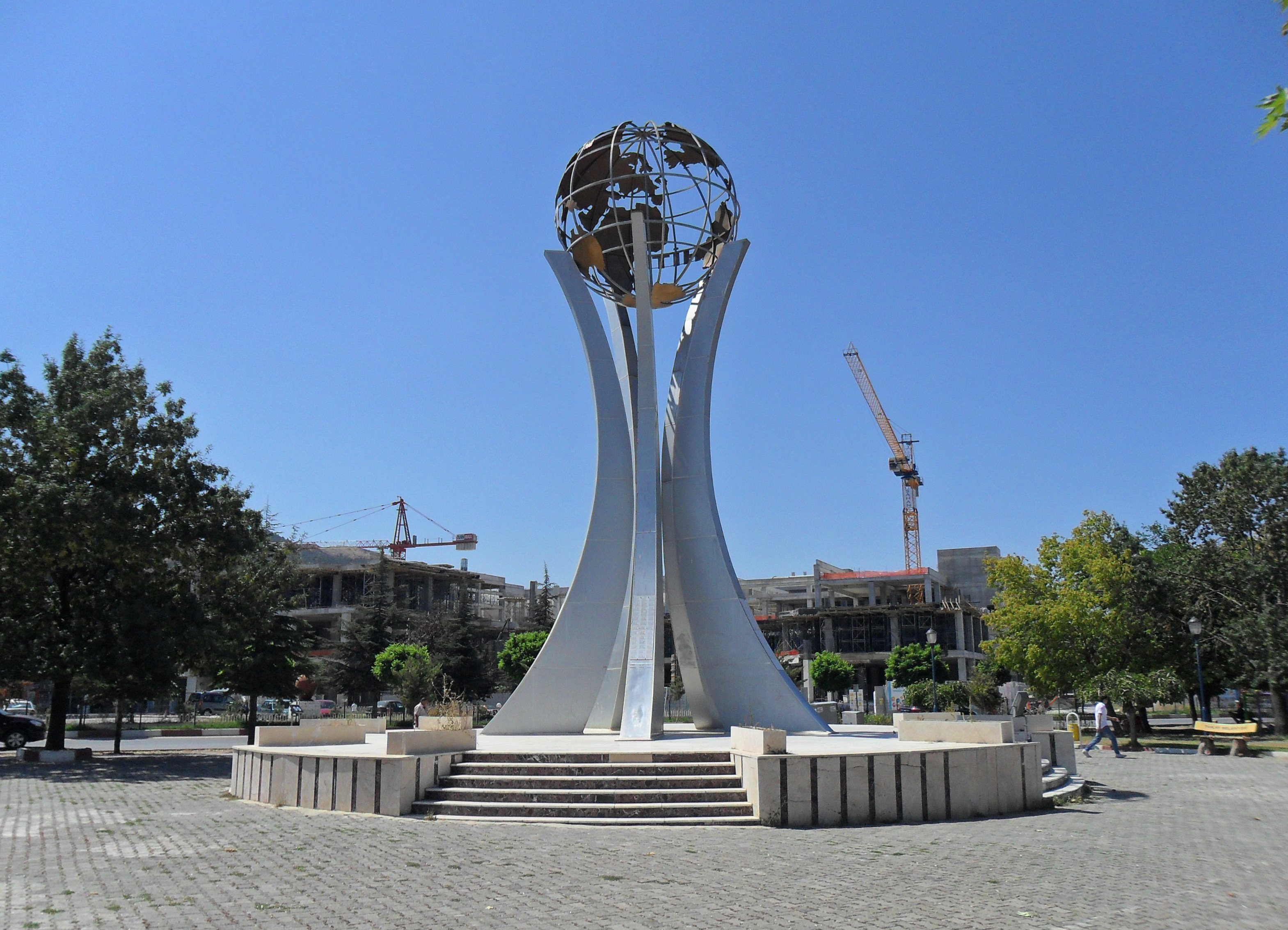 Tokat merkezde yer alan Şehitler Ölmez Anıtı.